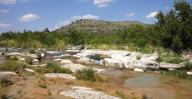 Devil's River - Dolan Falls